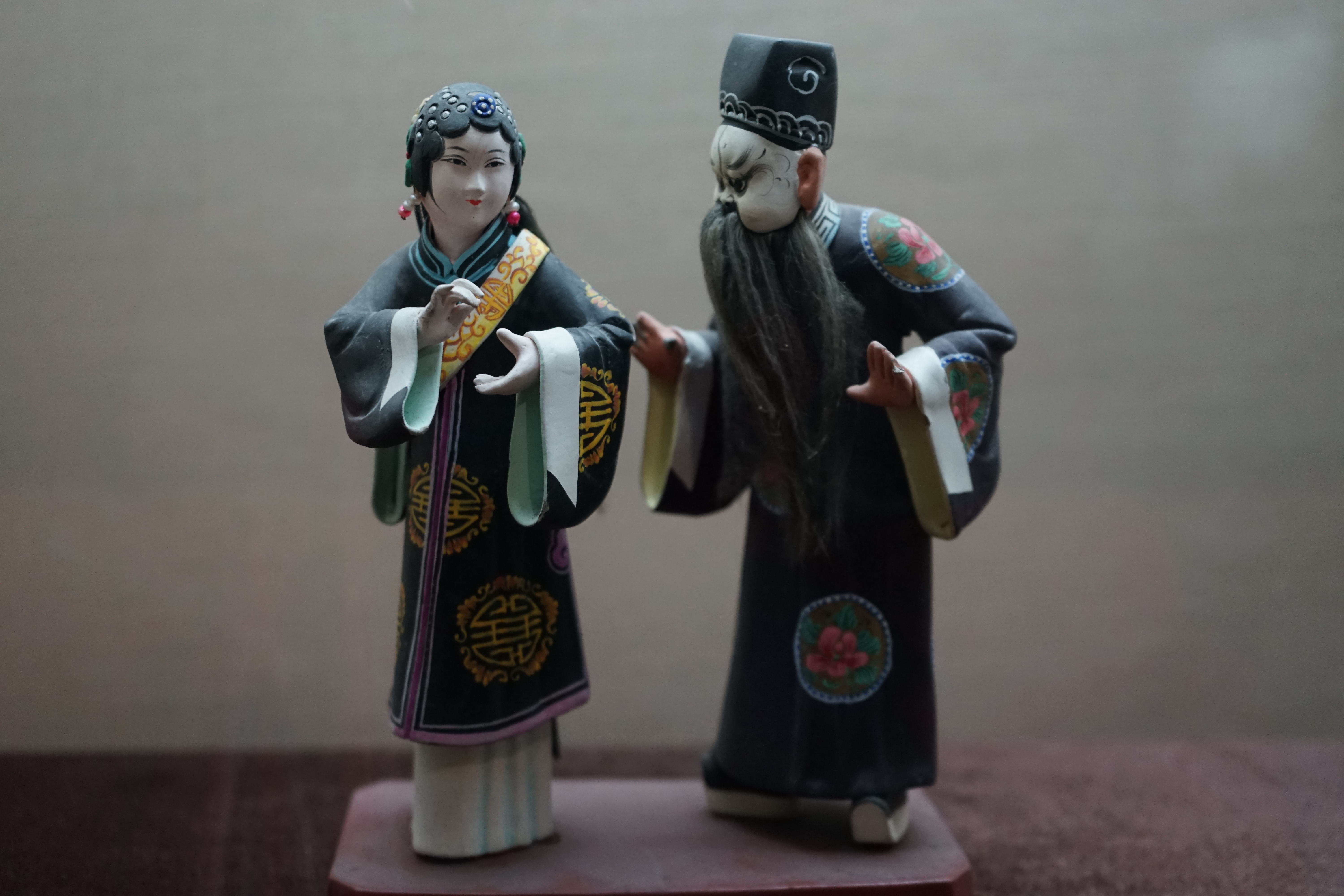 中文（中国大陆）: 《宇宙锋》无锡博物院